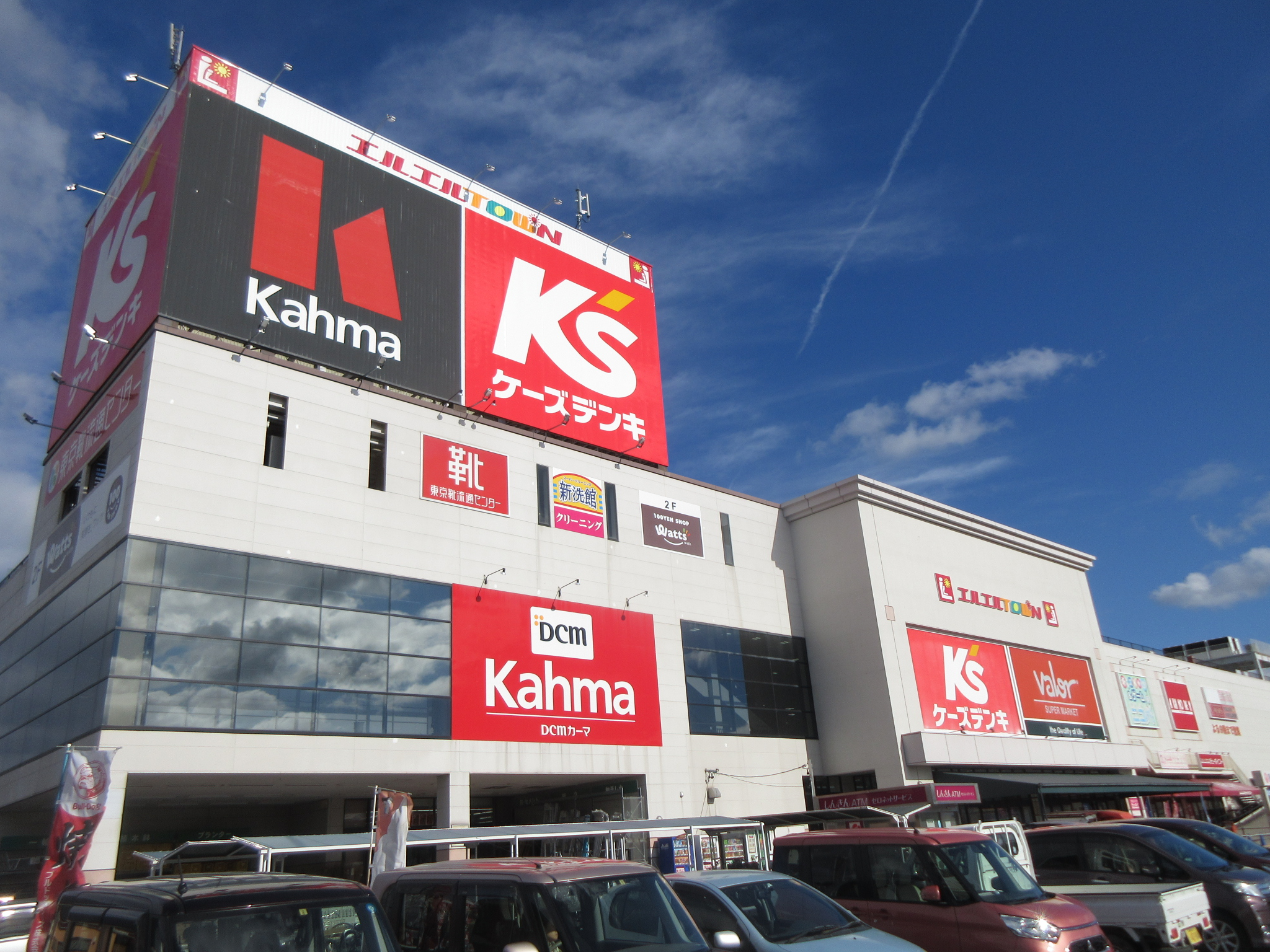 エルエルTOWN（岡崎市上和田町）